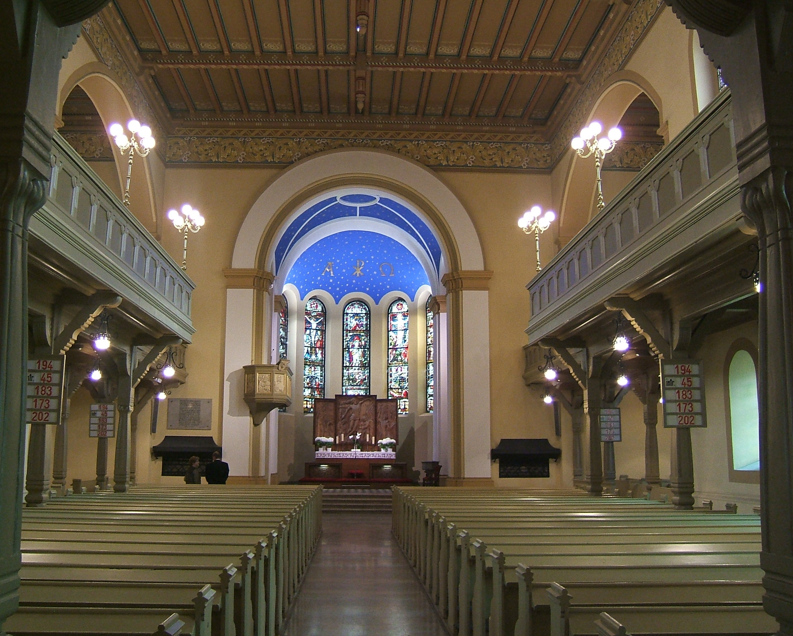 Blick in den Chor der evangelischen Kirche zu Kattowitz.